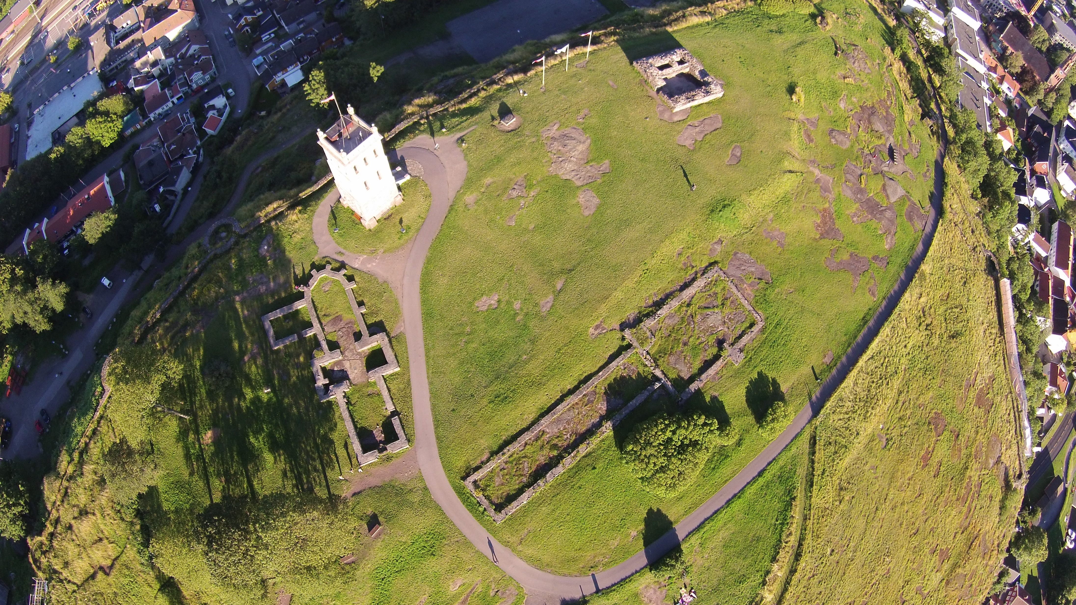 Luftfoto av Tunsberghus festning